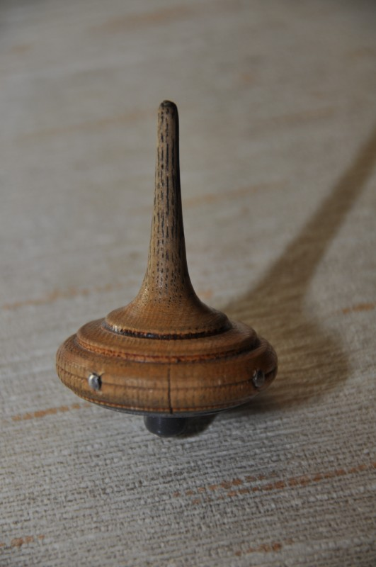 Tischkegelkreisel